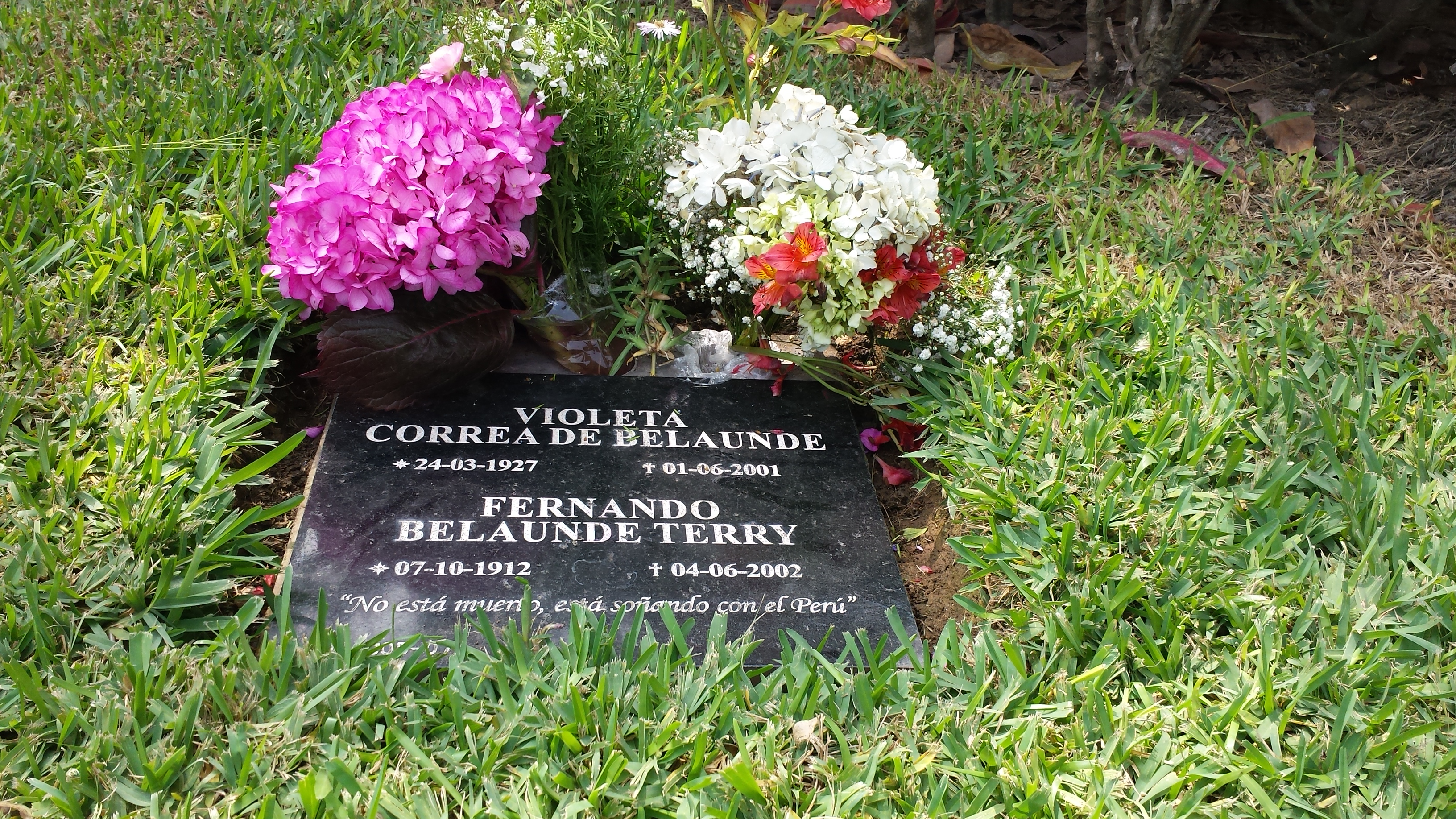 Tumba de Fernando Belaunde Terry , es ubicado en el Cementerio Campo fe en Huachipa.(Lima este)